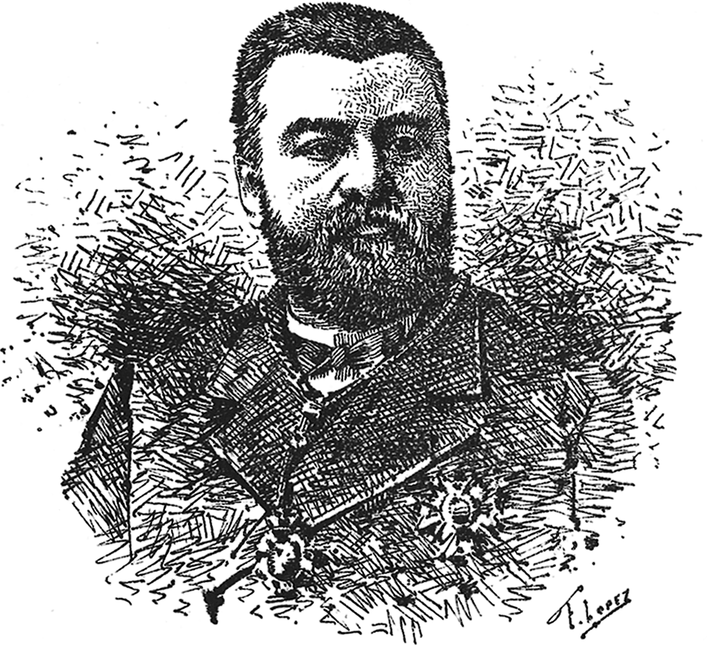 Camilo Villavasoren erretratua. Egilea: Francisco López Alén. Euskal-Erria : revista bascongada San Sebastián T. 21 (2o sem. 1889), p. 112